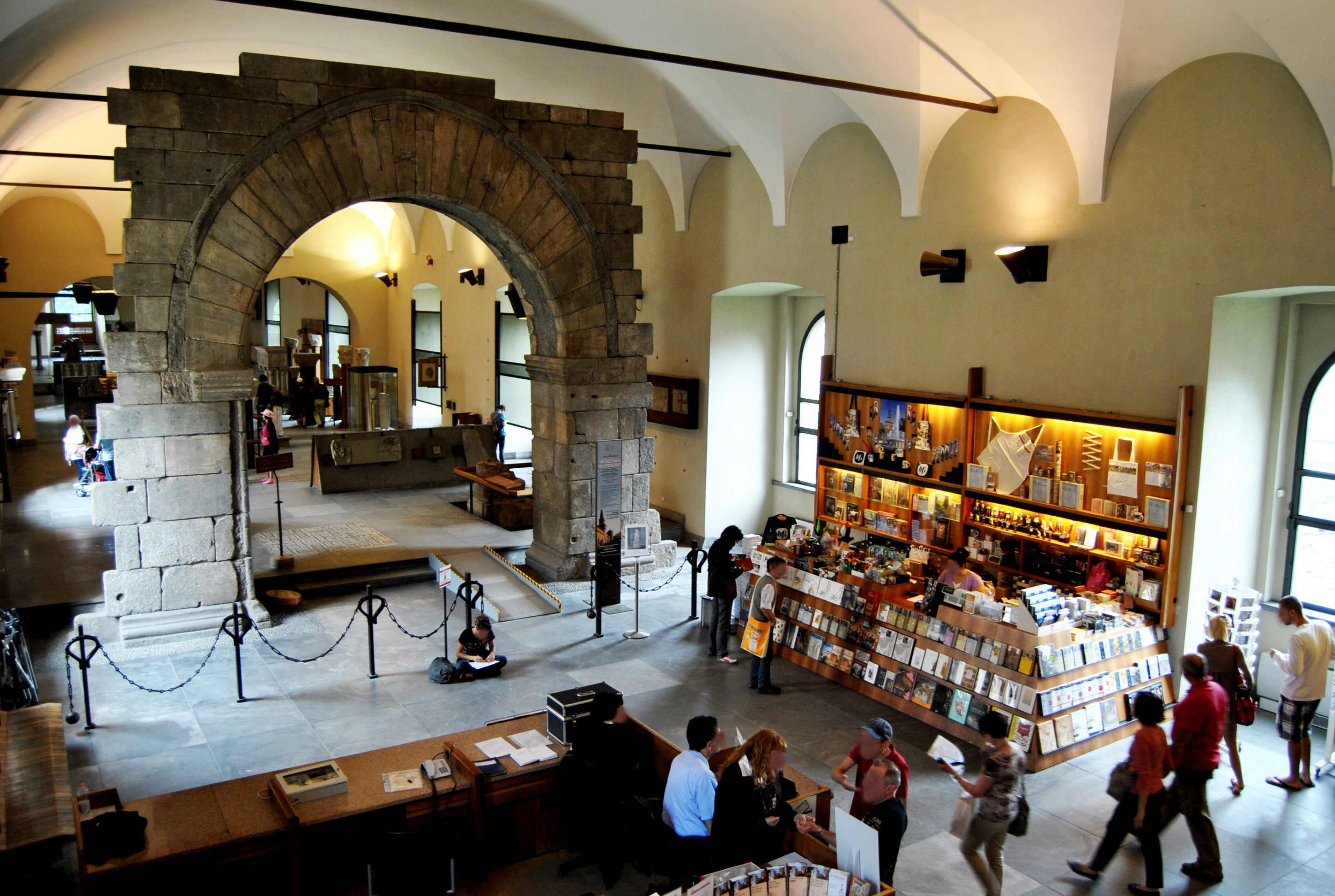 Visuale dalla scala dell'ingresso al museo che comprende il banco informazioni, la Pusterla dei Fabbri e il book shop.